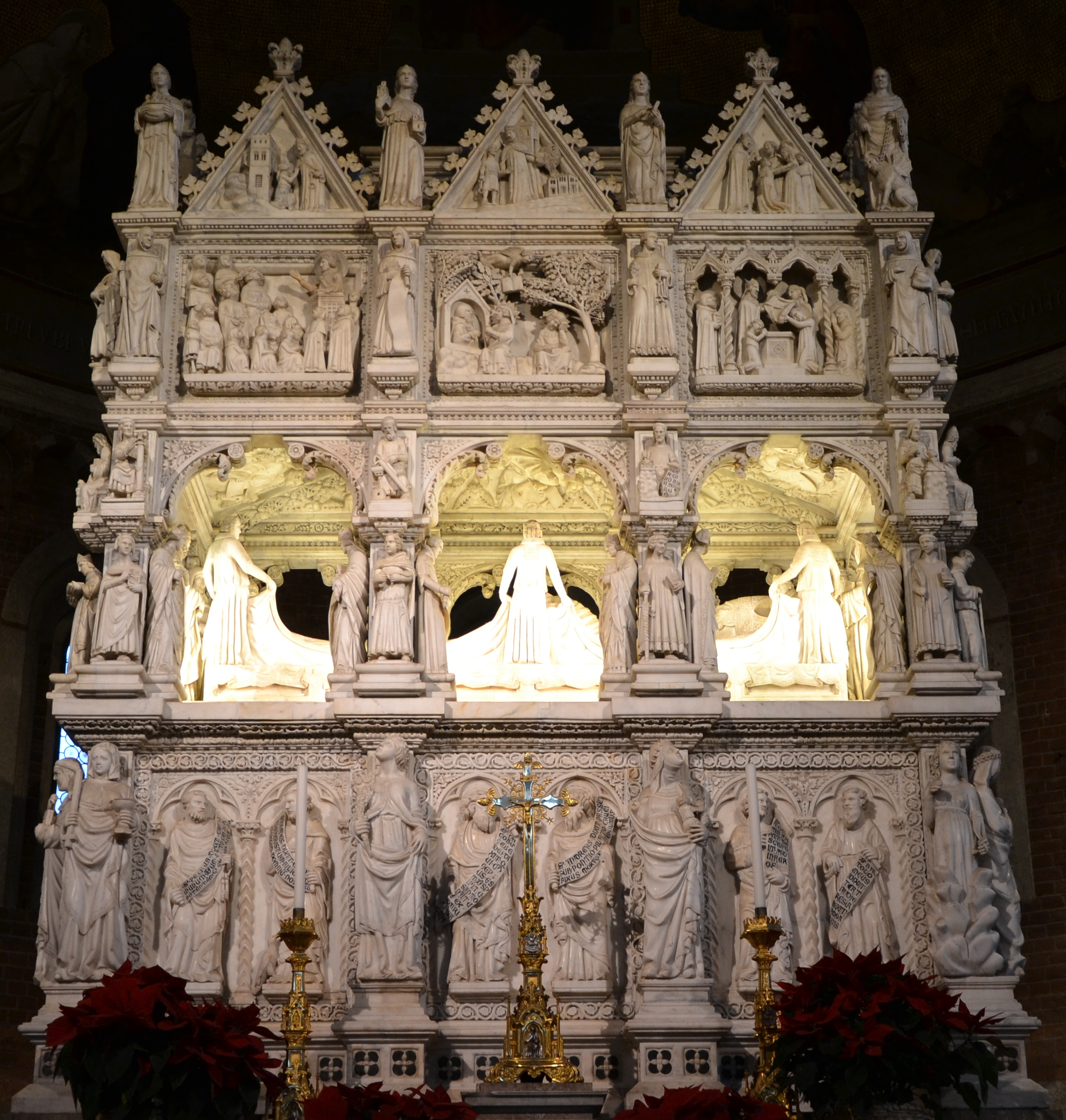 Arca marmorea di S. Agostino, Pavia, S. Pietro in Ciel d'Oro, commissionata nel 1362 da Bonifacio Bottigella, priore del convento degli Eremitani di sant'Agostino, di autori ignoti